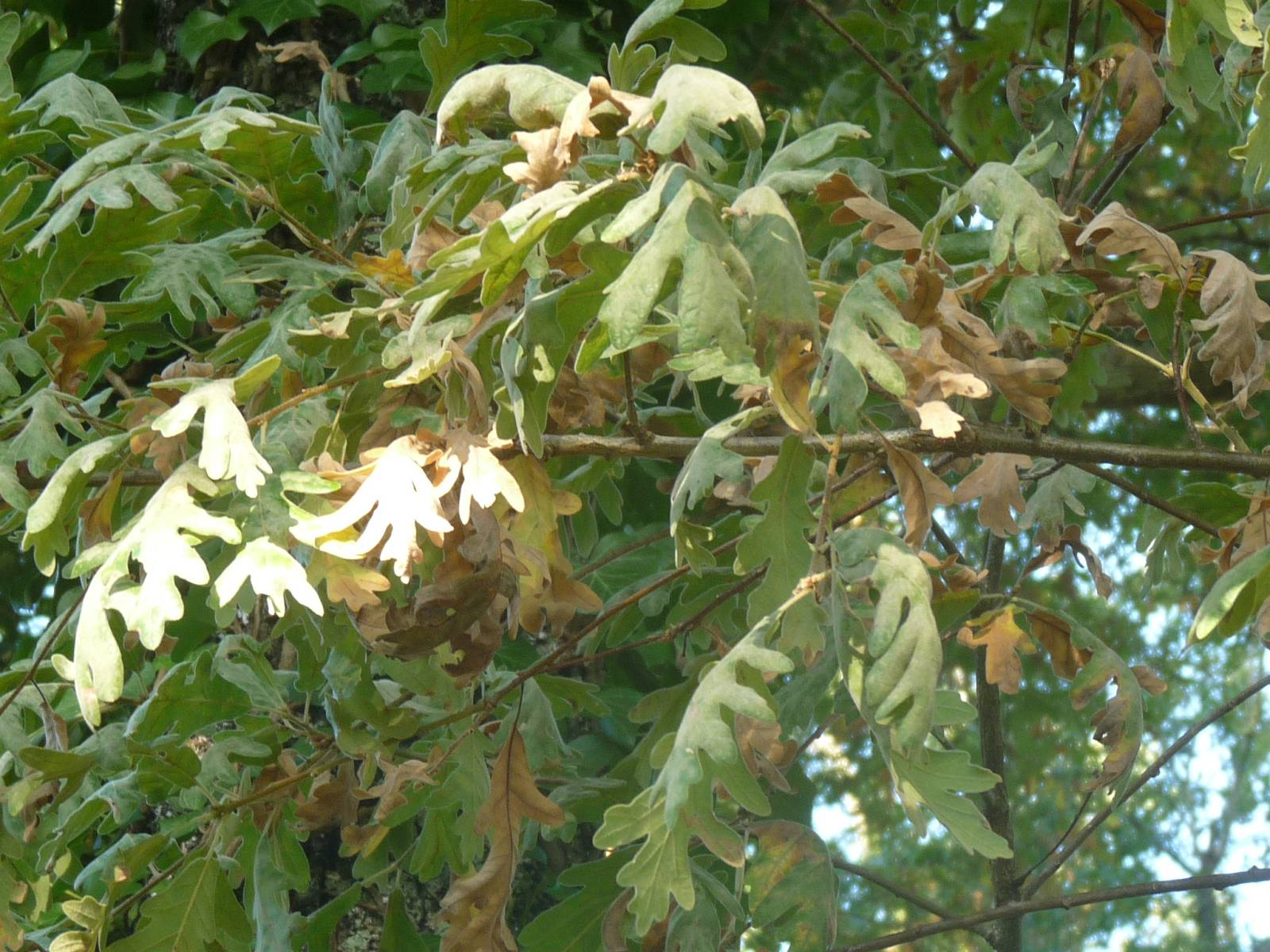 feuilles de chêne tauzin, dans la Double saintongeaise, Sauvignac (16), France